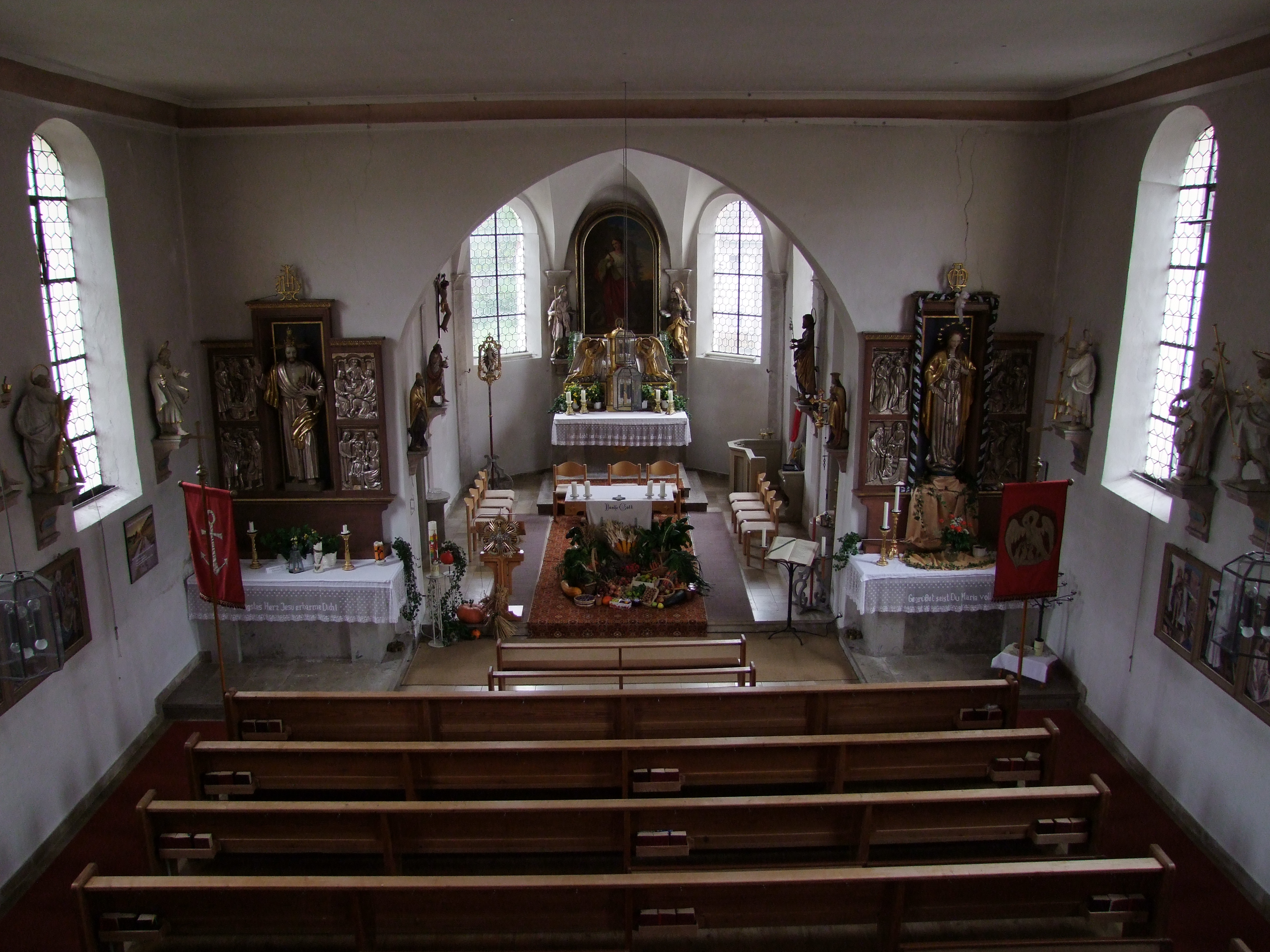 St. Margareta im oberschwäbischen Irsingen, einem Ortsteil von Türkheim in Bayerisch/Schwaben